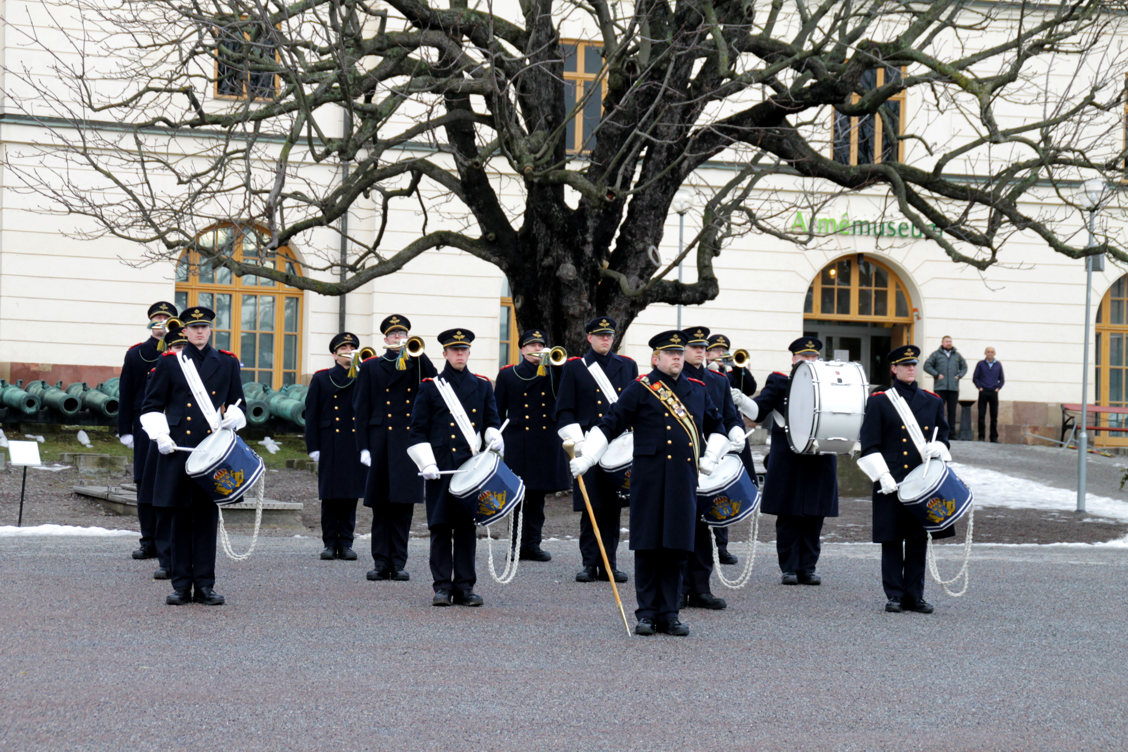 Hemvärnets trumkår ur Hemvärnets Musikkår Uppsala och Hemvärnets Musikkår Gävle på Armémuseum i samband med vintervaktparad nyårsdagen 1/1 2013.